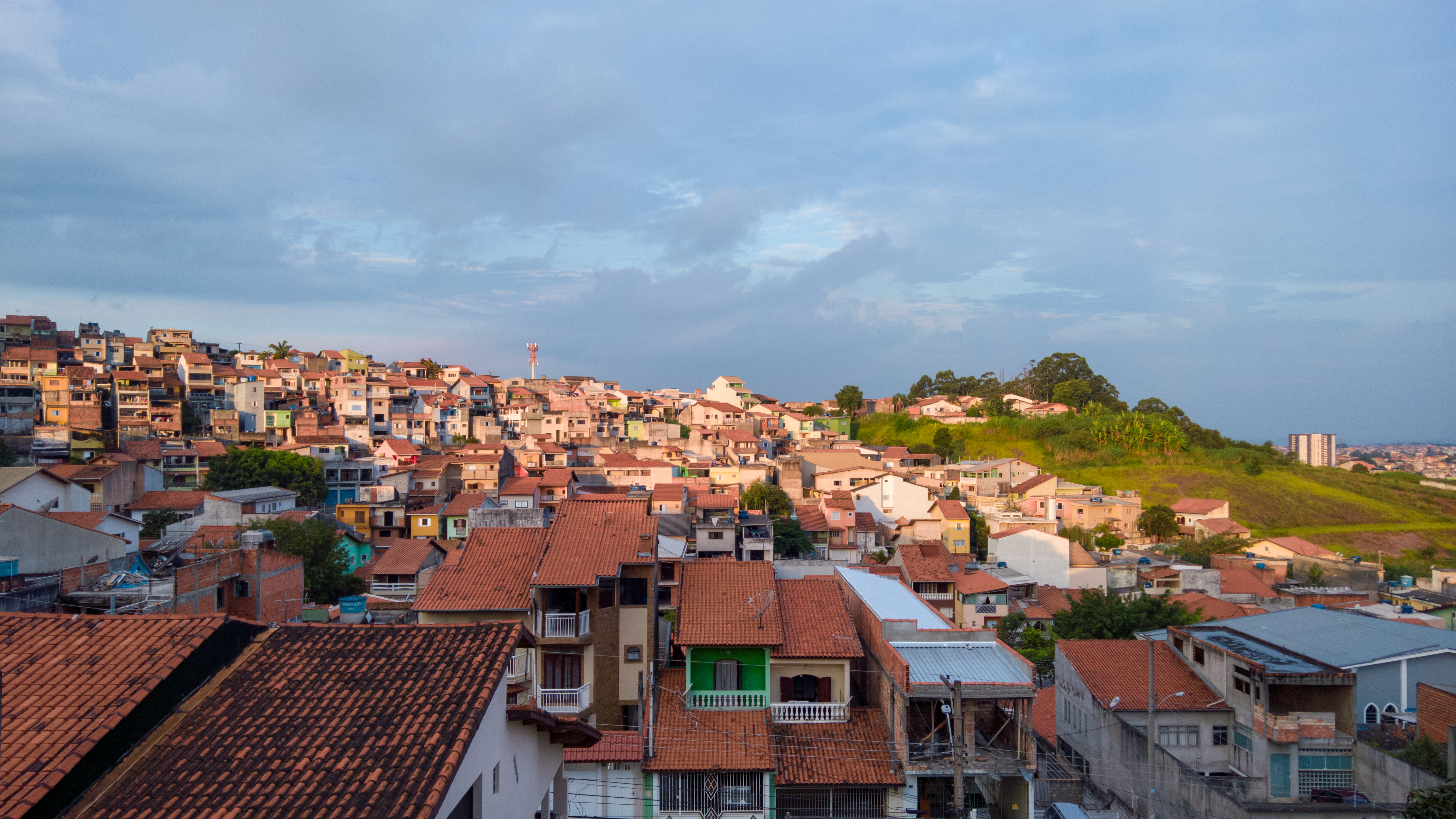 Sector Parque Continental, en la ciudad de Guarulhos (Brasil).